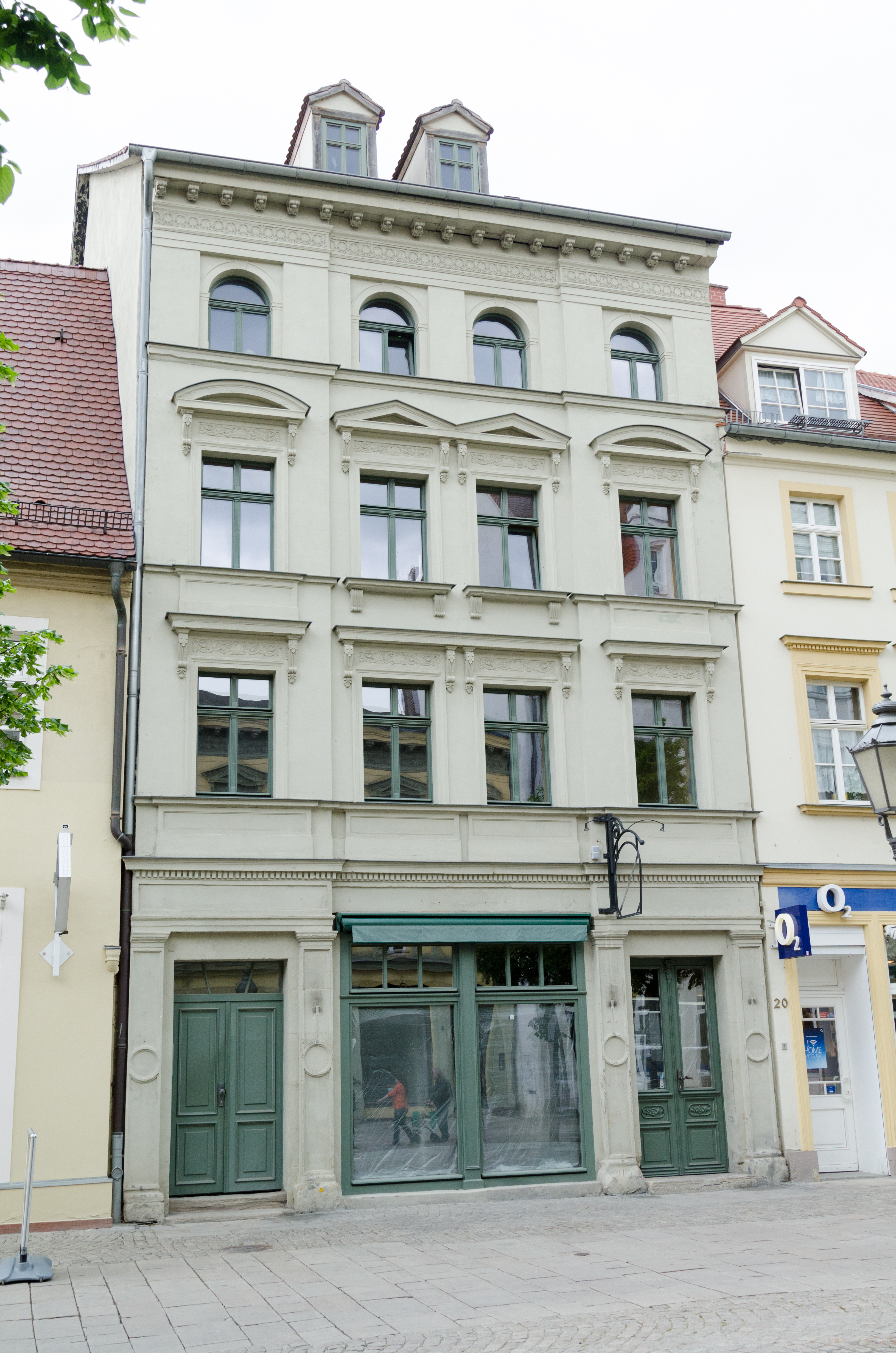 Zeitz, Roßmarkt 21